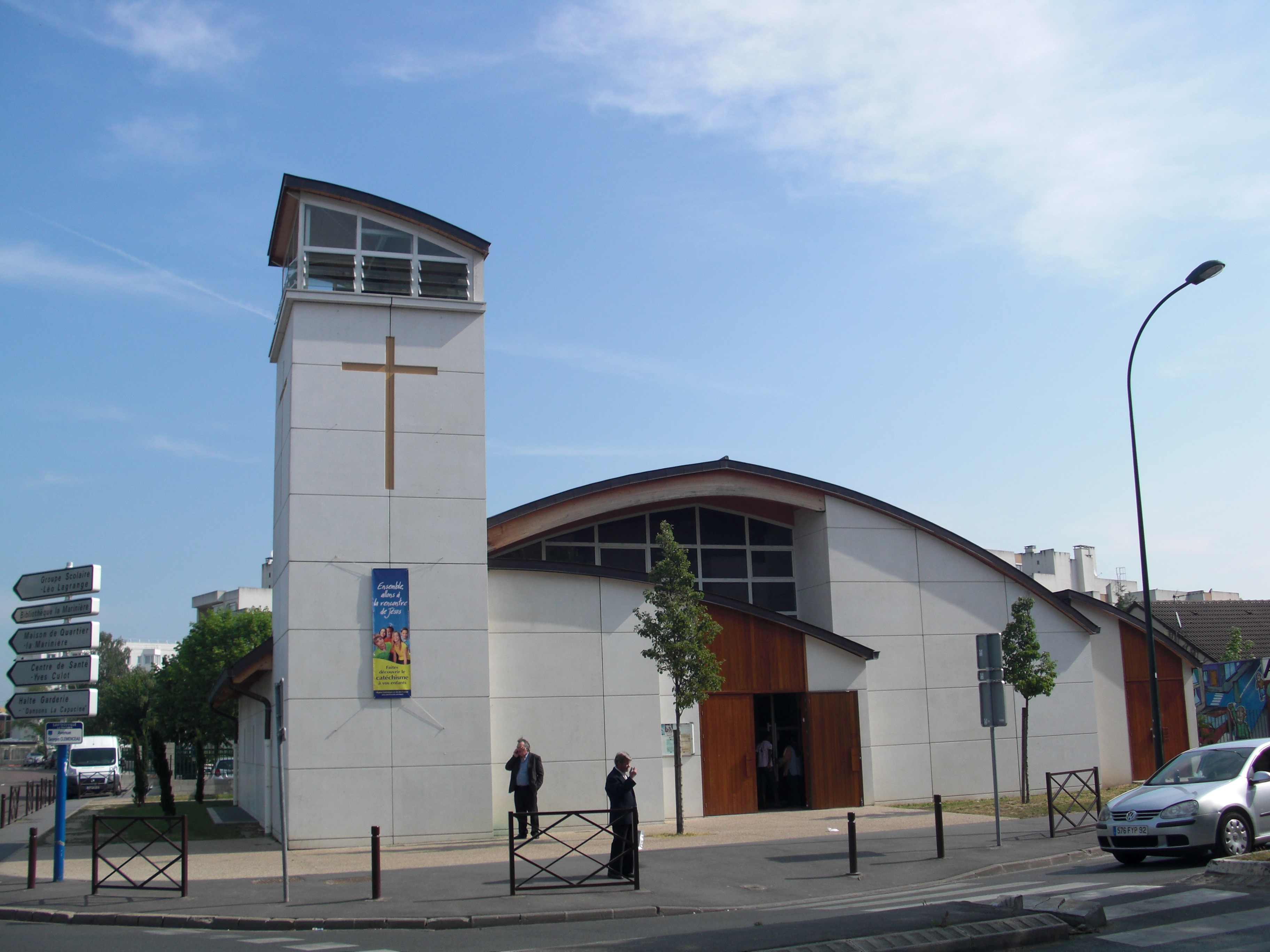 Église Jean-XXIII de Sartrouville (Yvelines)